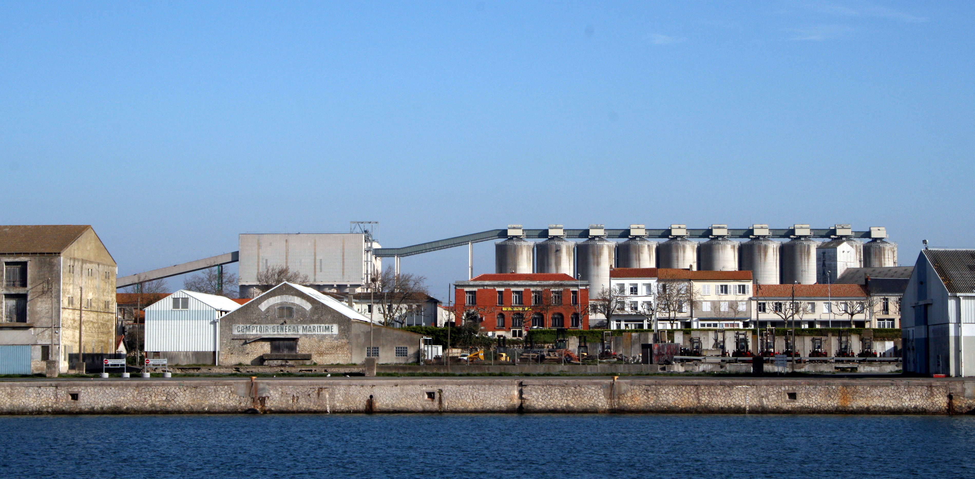 Comptoir général maritime à la Rochelle